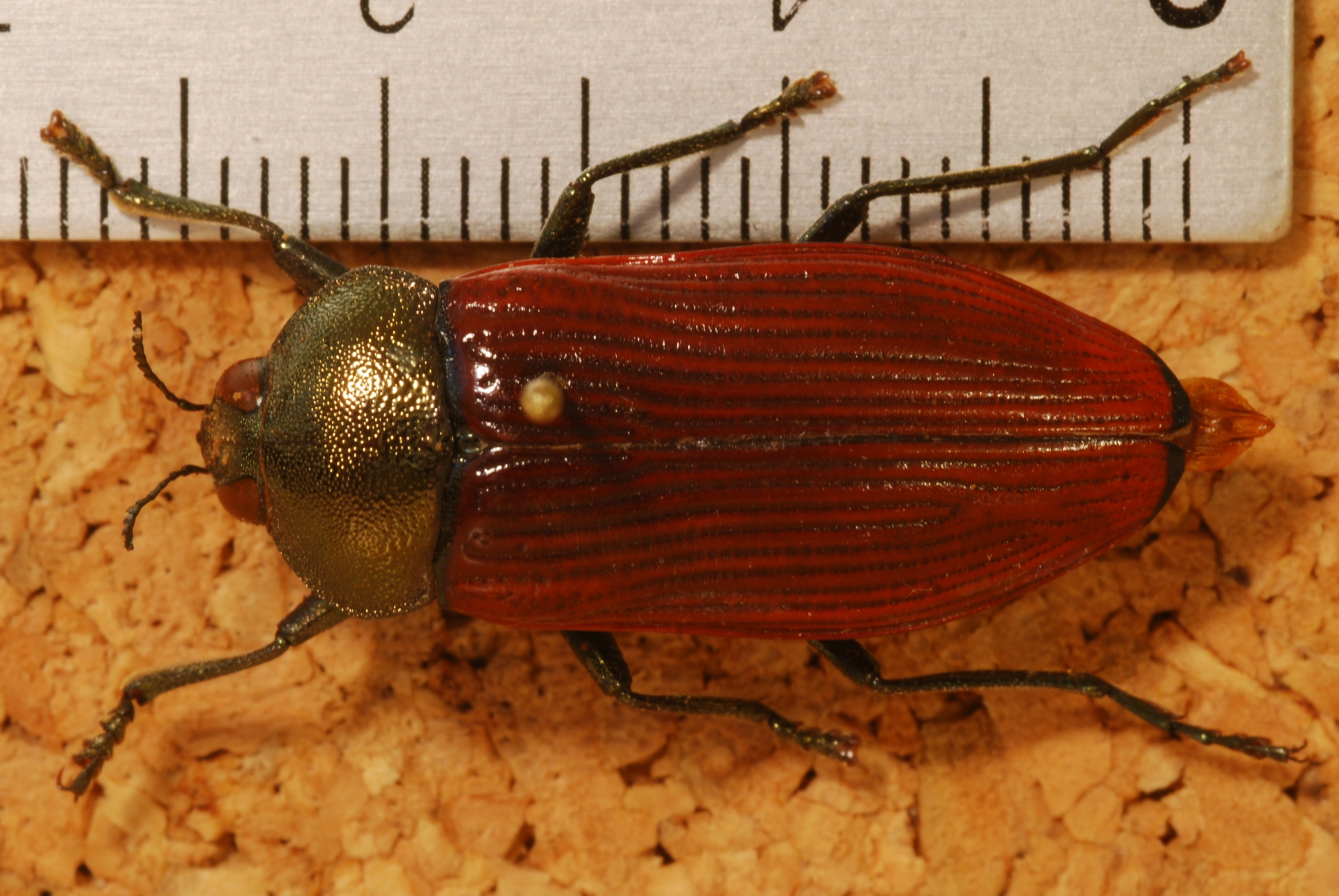 Norsemann, Western Australia, AUSTRALIA